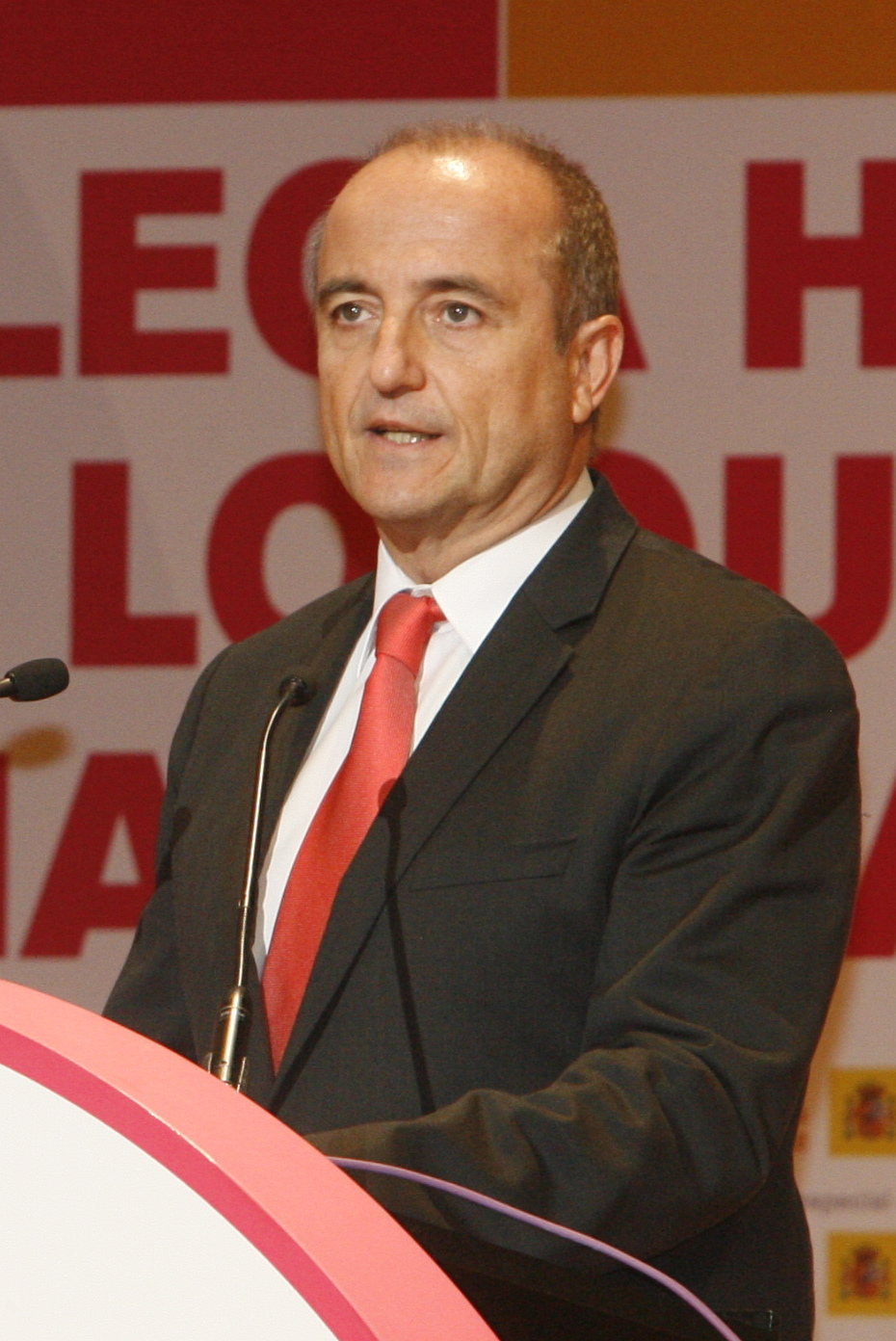 El Ministro Miguel Sebastián fue uno de los encargados de dar el pistoletazo de salida a FICOD 2010, demostrando el compromiso que su Ministerio tiene con la industria de los contenidos digitales